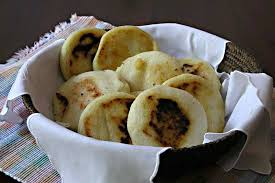 es el plato tipico de toda venezuela.